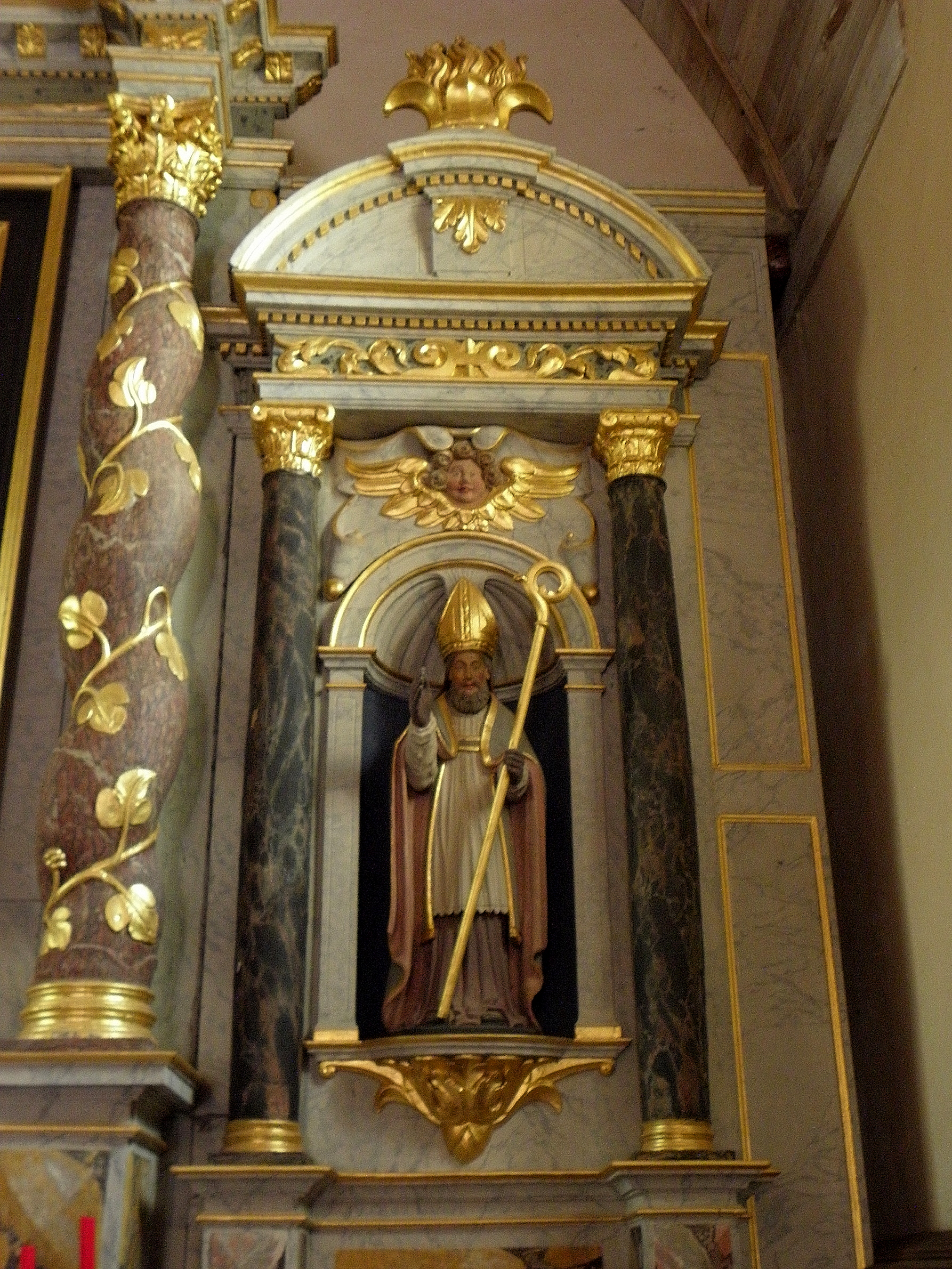 Église Saint-Aubin de Saint-Aubin-du-Pavail (35). Maître-autel et son retable. Statue de Saint-Éloi.